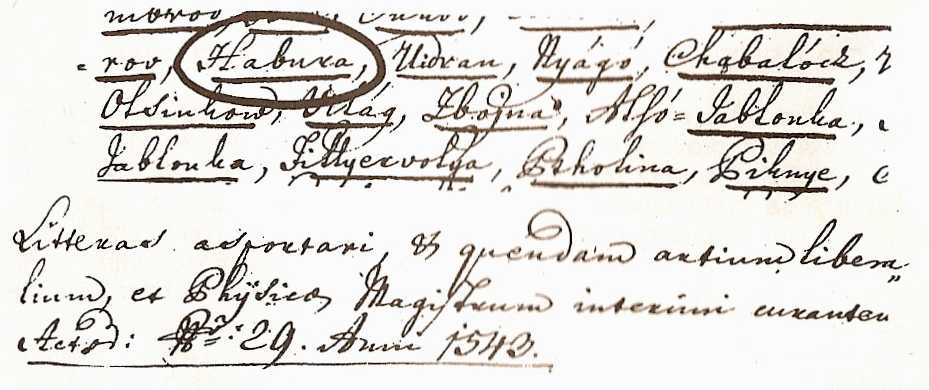 Prvá písomná zmienka o Habure z roku 1543